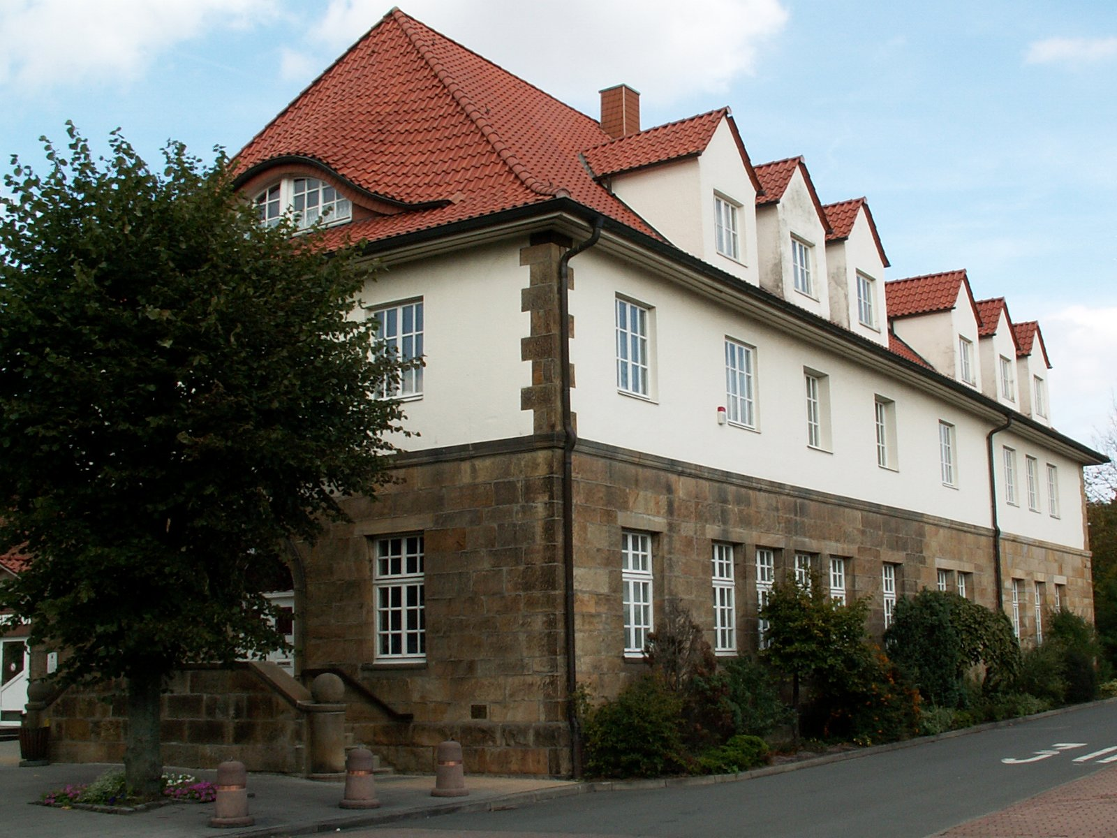 Rathaus in Bohmte, Bremer Straße 4, Ansicht von Südwesten